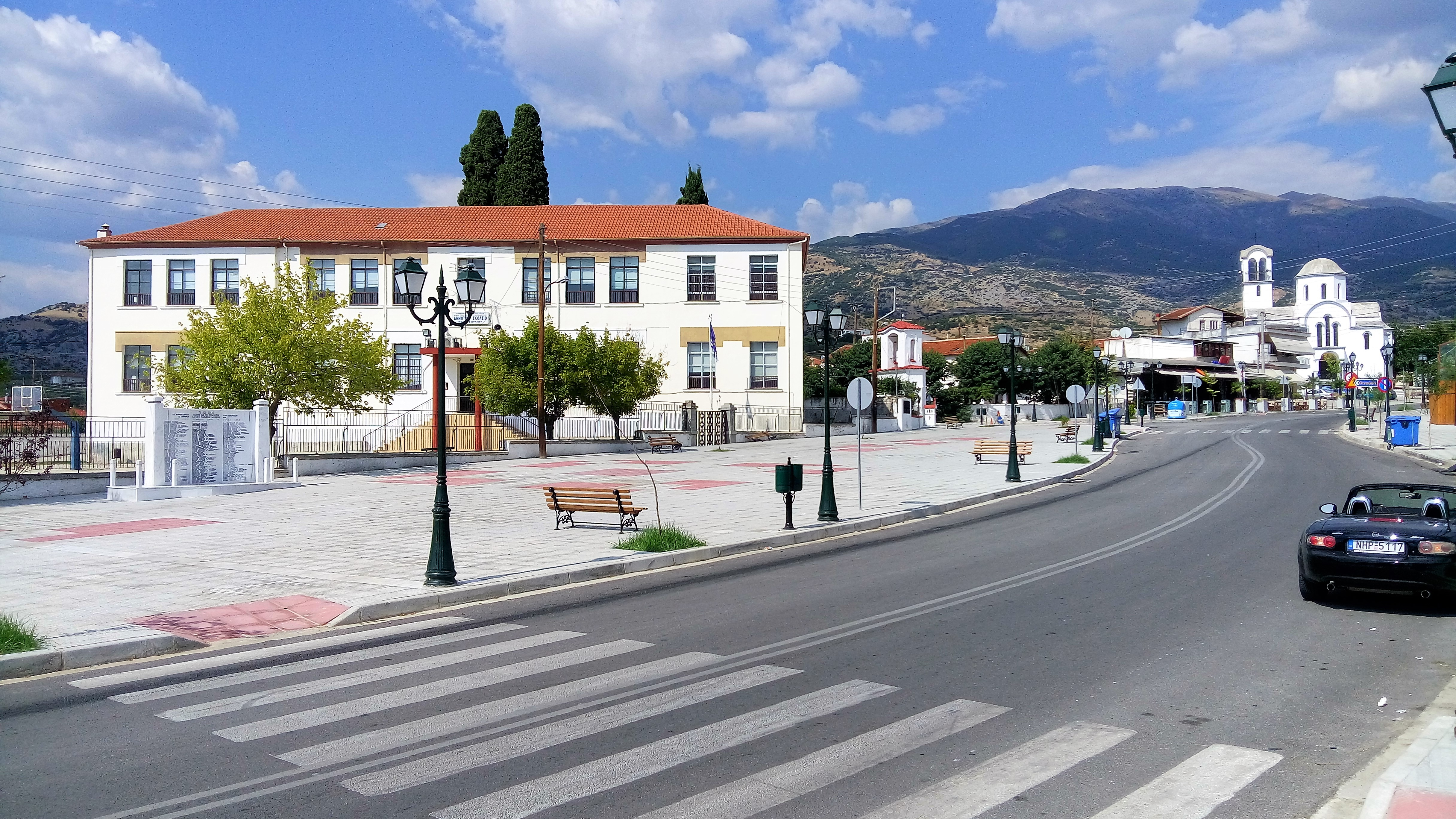 Η είσοδος του χωρίου μετά την ανάπλασή της το 2016. Αριστερά φαίνεται το Δημοτικό Σχολείο και στο βάθος ο δρόμος οδηγεί στην κεντρική πλατεία του χωριού. Διακρίνεται το εκκλησάκι του Αγίου Δημητρίου